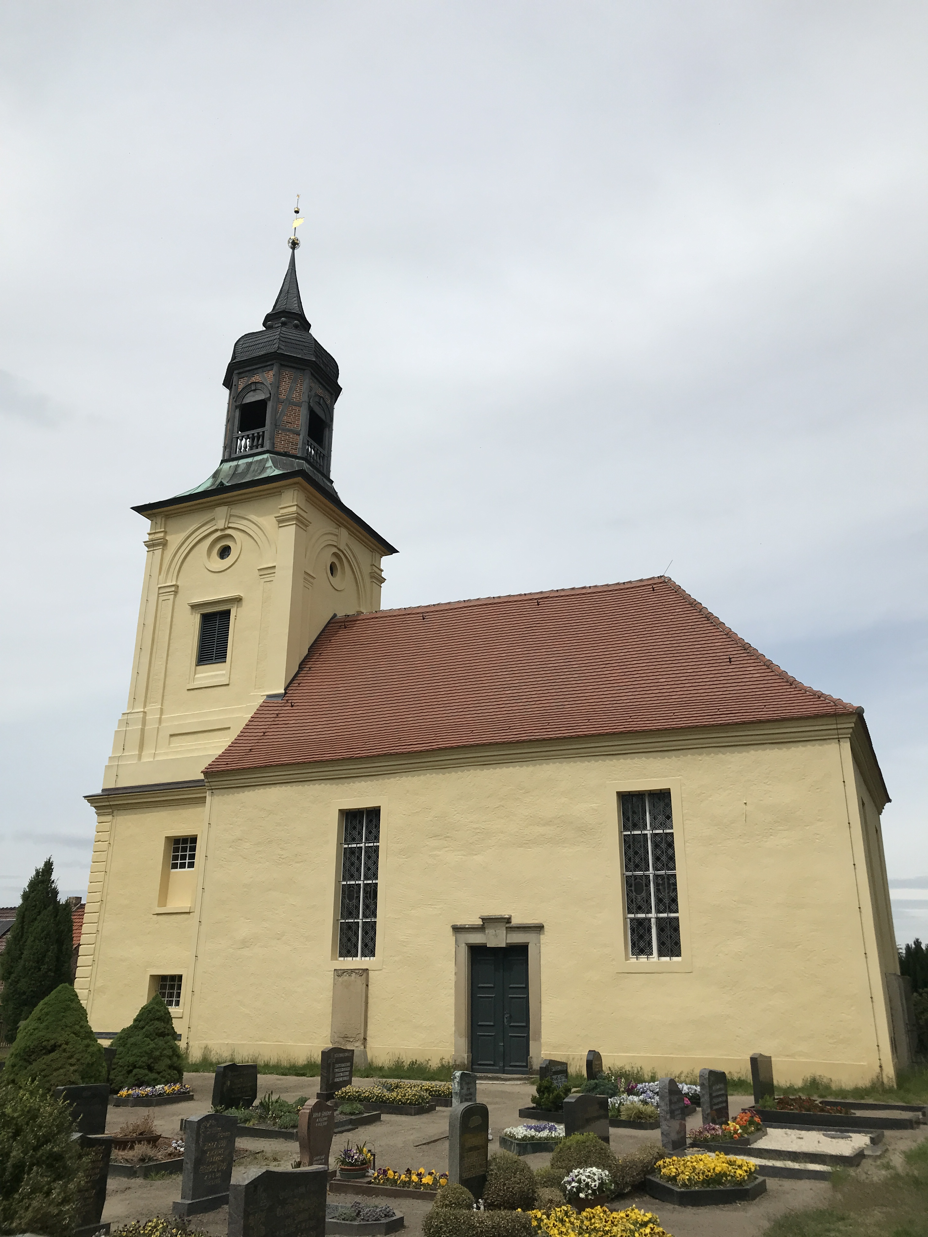 Die Dorfkirche Ahlsdorf ist eine Feldsteinkirche aus dem 14. Jahrhundert in Ahlsdorf, einem Ortsteil der Kleinstadt Schönewalde im Landkreis Elbe-Elster. Der Innenraum ist reich ausgestattet.